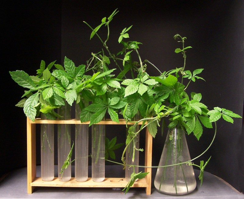 Zuchtversuch, Wurzelbildung